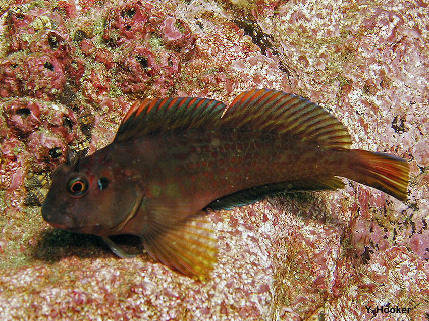 Pez de la familia Blenniidae, en Perú es famoso por la toxina que contiene la que, al ser consumido, produce alteraciones y alucinaciones parecidas a las de la intoxicación por consumo de alcohol (diablos azules), de ahi su nombre común.